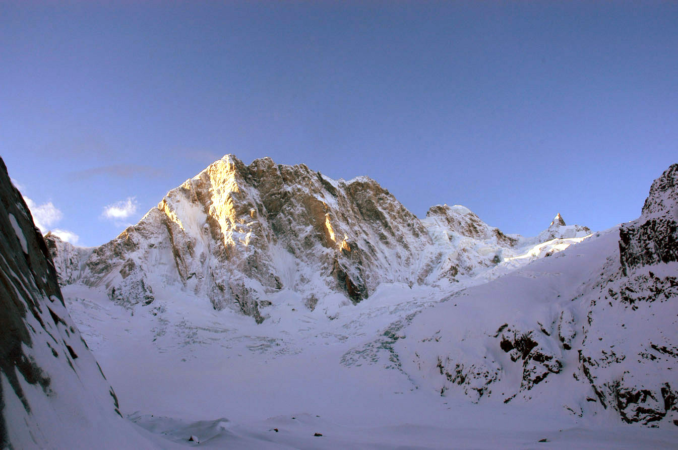 Die Grandes Jorasses in der Morgensonne. Das Bild wurde vom Leschaux Gletscher, unterhalb der Leschaux Hütte aufgenommen.